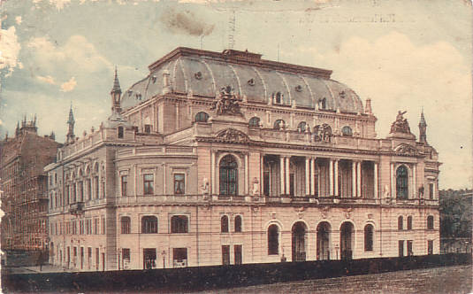 Filharmonia Warszawska.